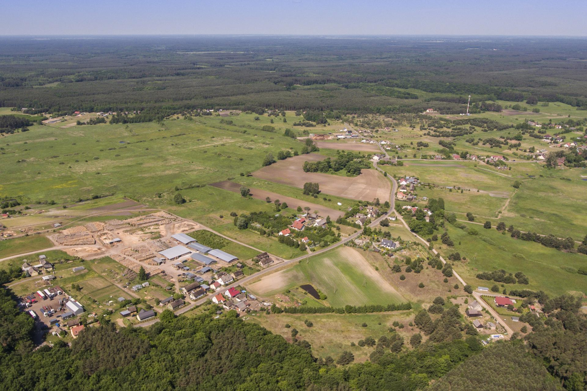 Łośno z lotu ptaka